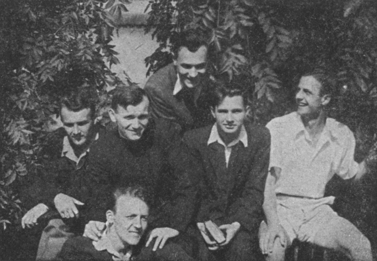 Karol Wojtyła - wikary w parafii Św. Floriana w Krakowie